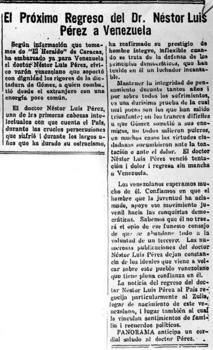 Noticia sobre el regreso a Venezuela del Dr. Néstor Luis Pérez Luzardo, después de la muerte de Juan Vicente Gómez y la caída de su dictadura.